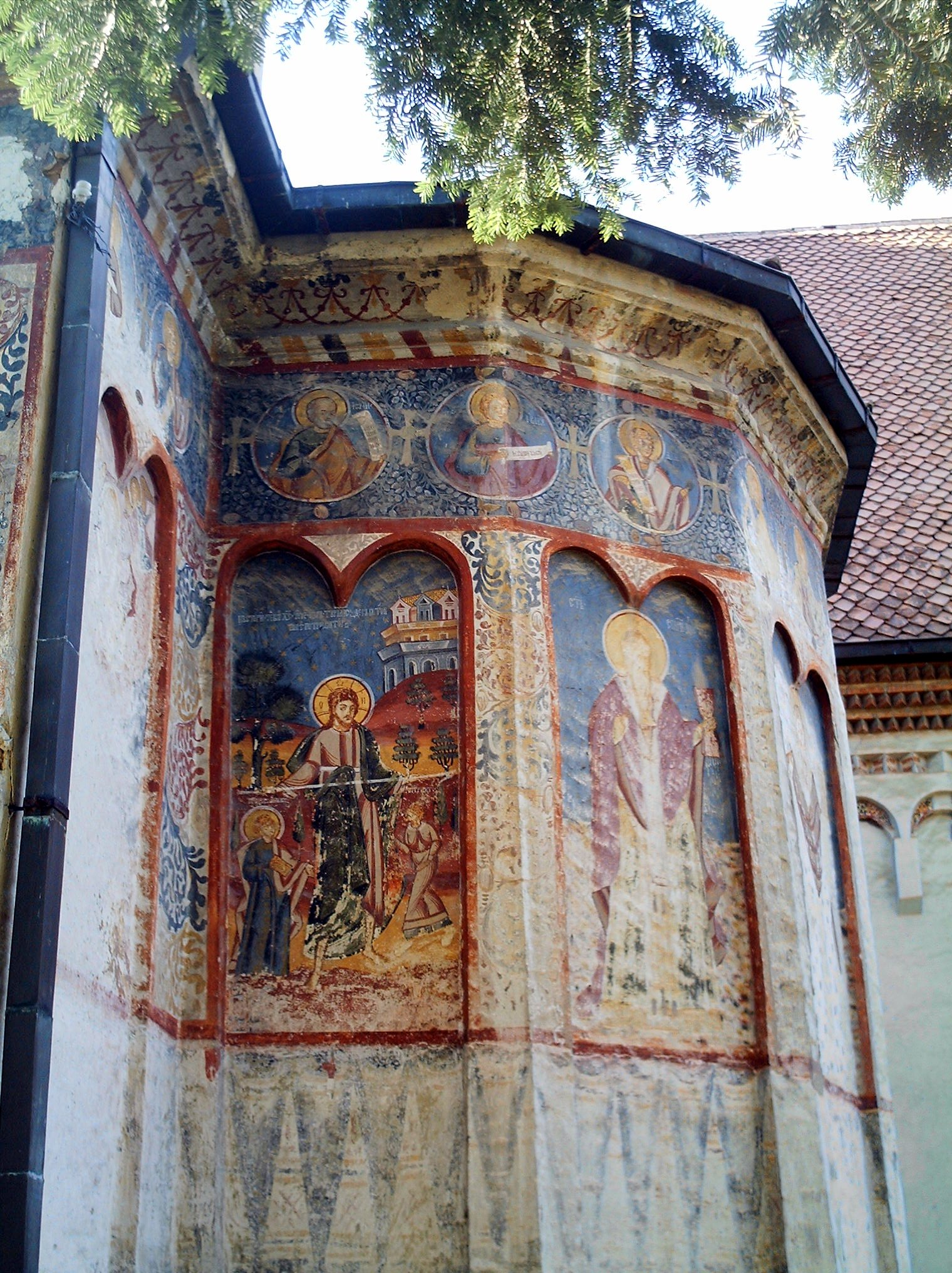 Sf Nicolae Braşov